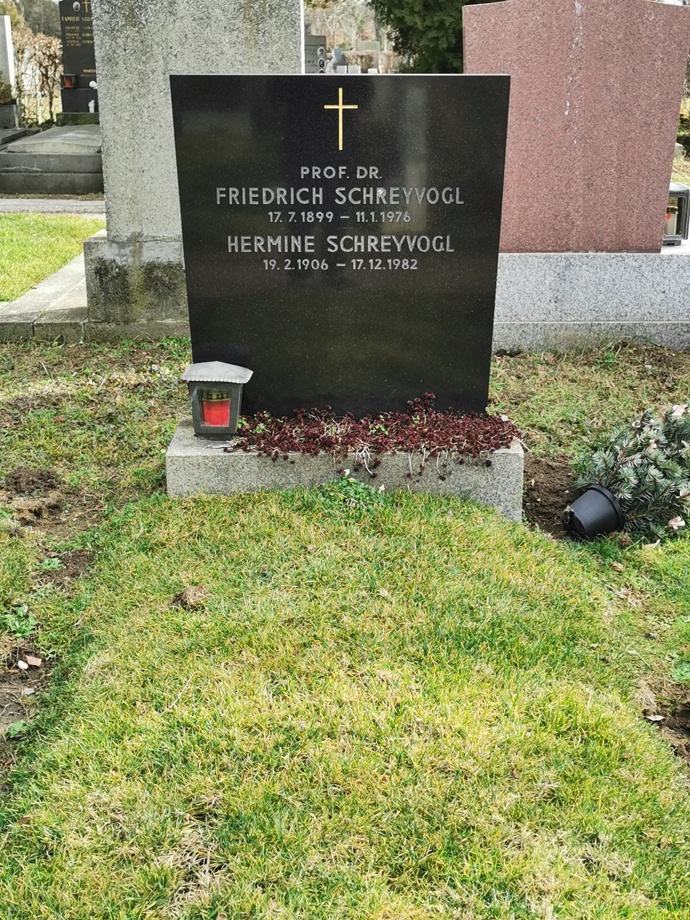 Gravb von Friedrich Schreyvogl auf dem Wiener Zentralfriedhof